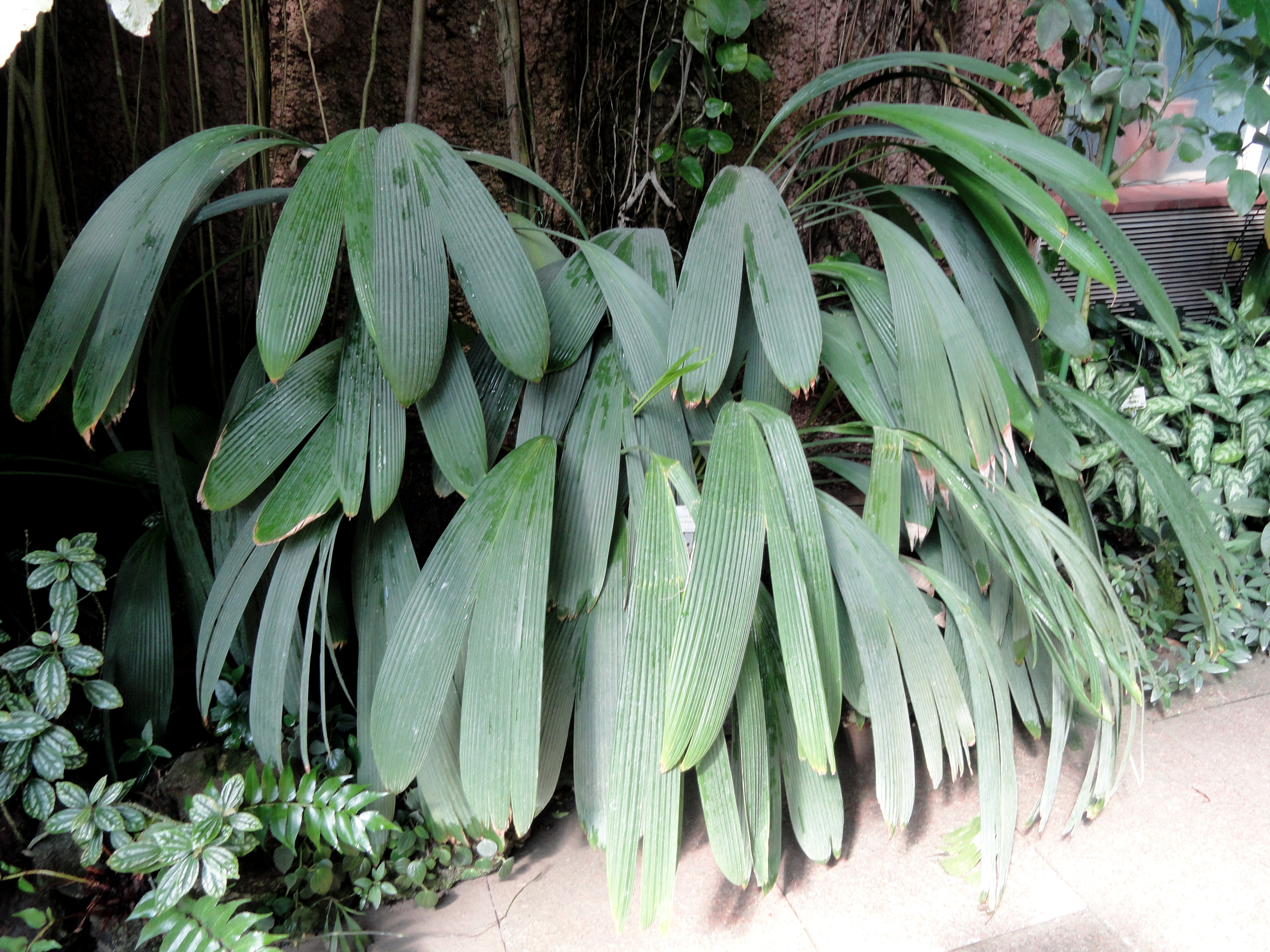 Dicranopygium atrovirens specimen in the Botanischer Garten München-Nymphenburg, Munich, Germany.